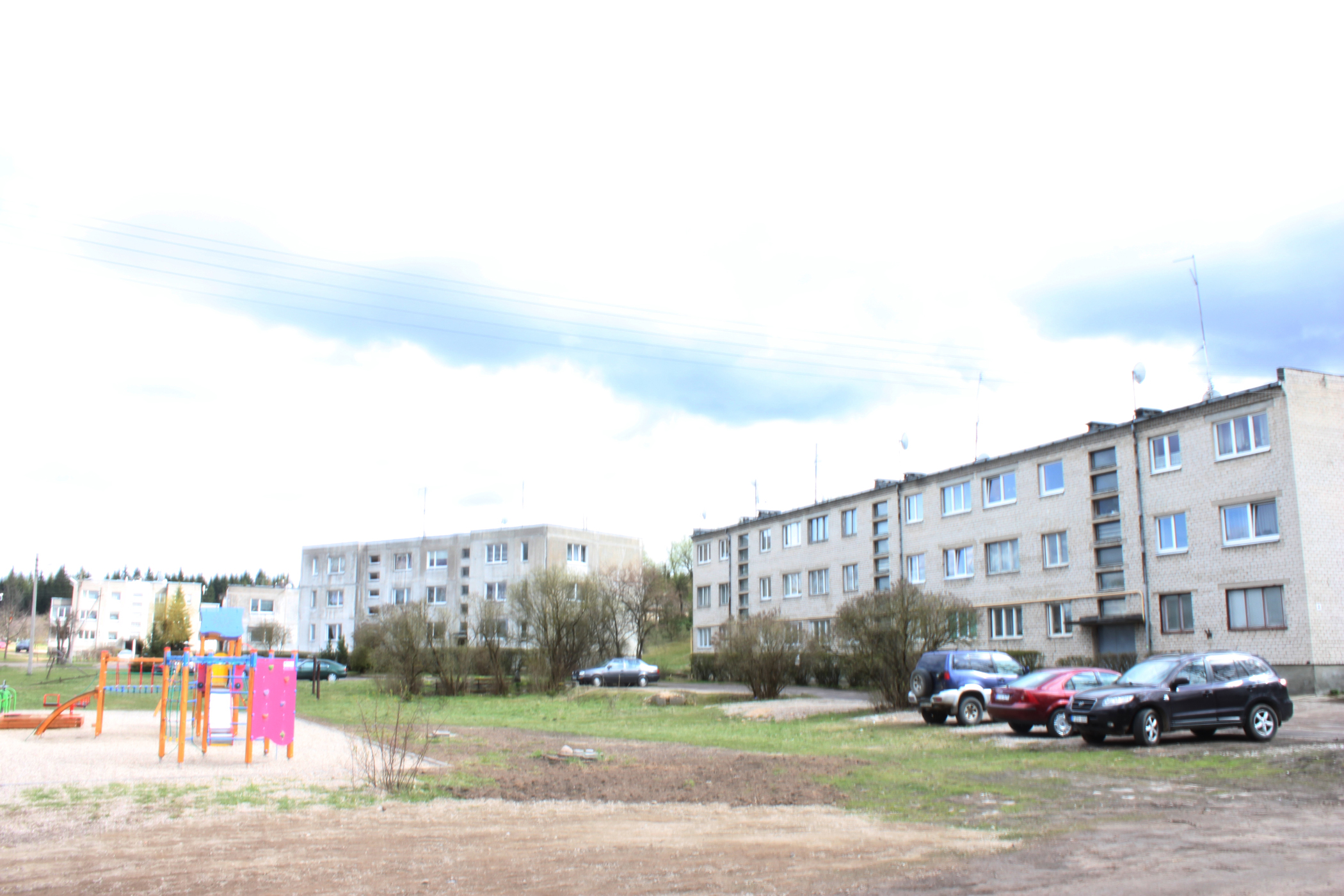 Vėliučionys, Vilniaus r.